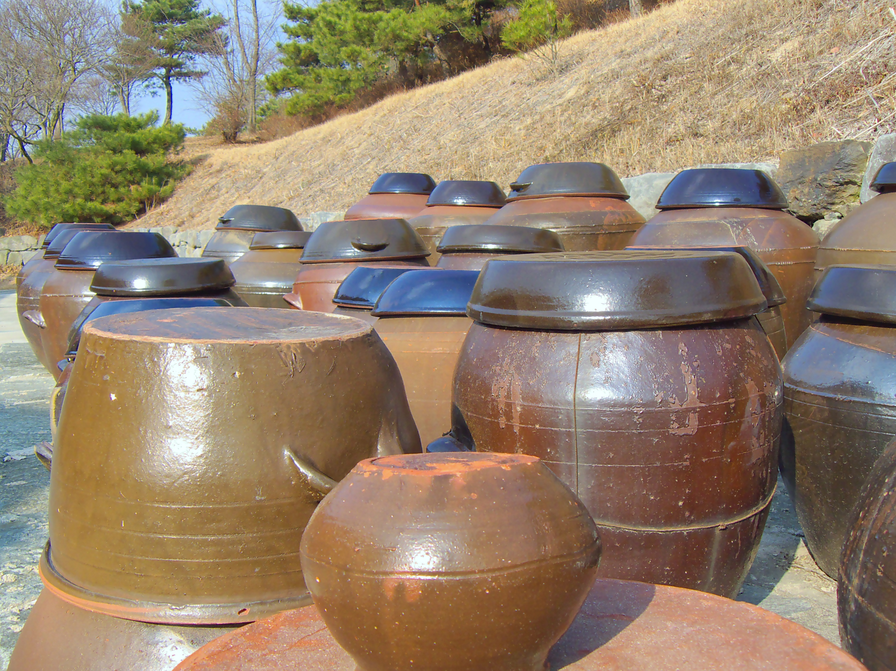 Onggi.